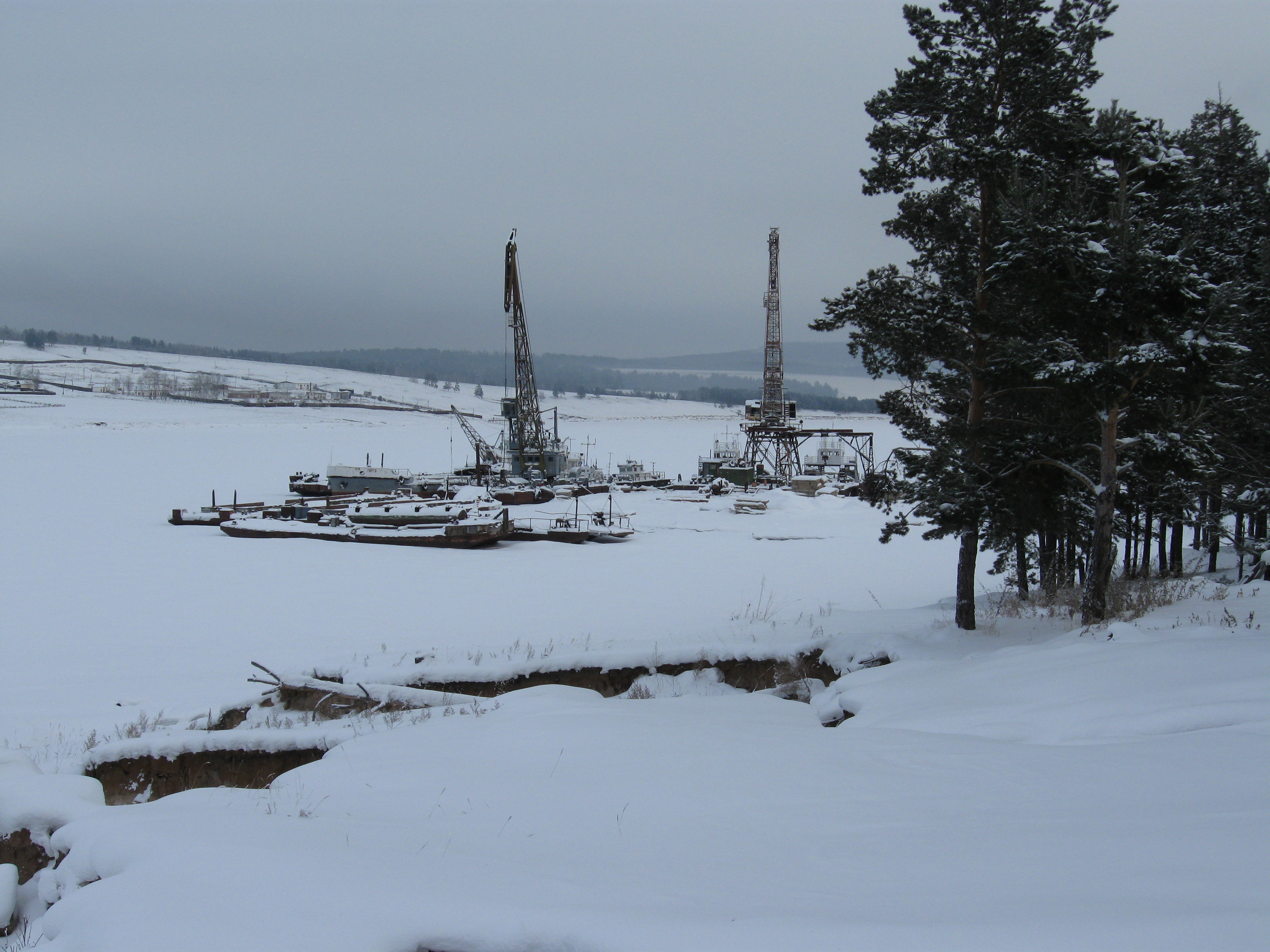 речной порт